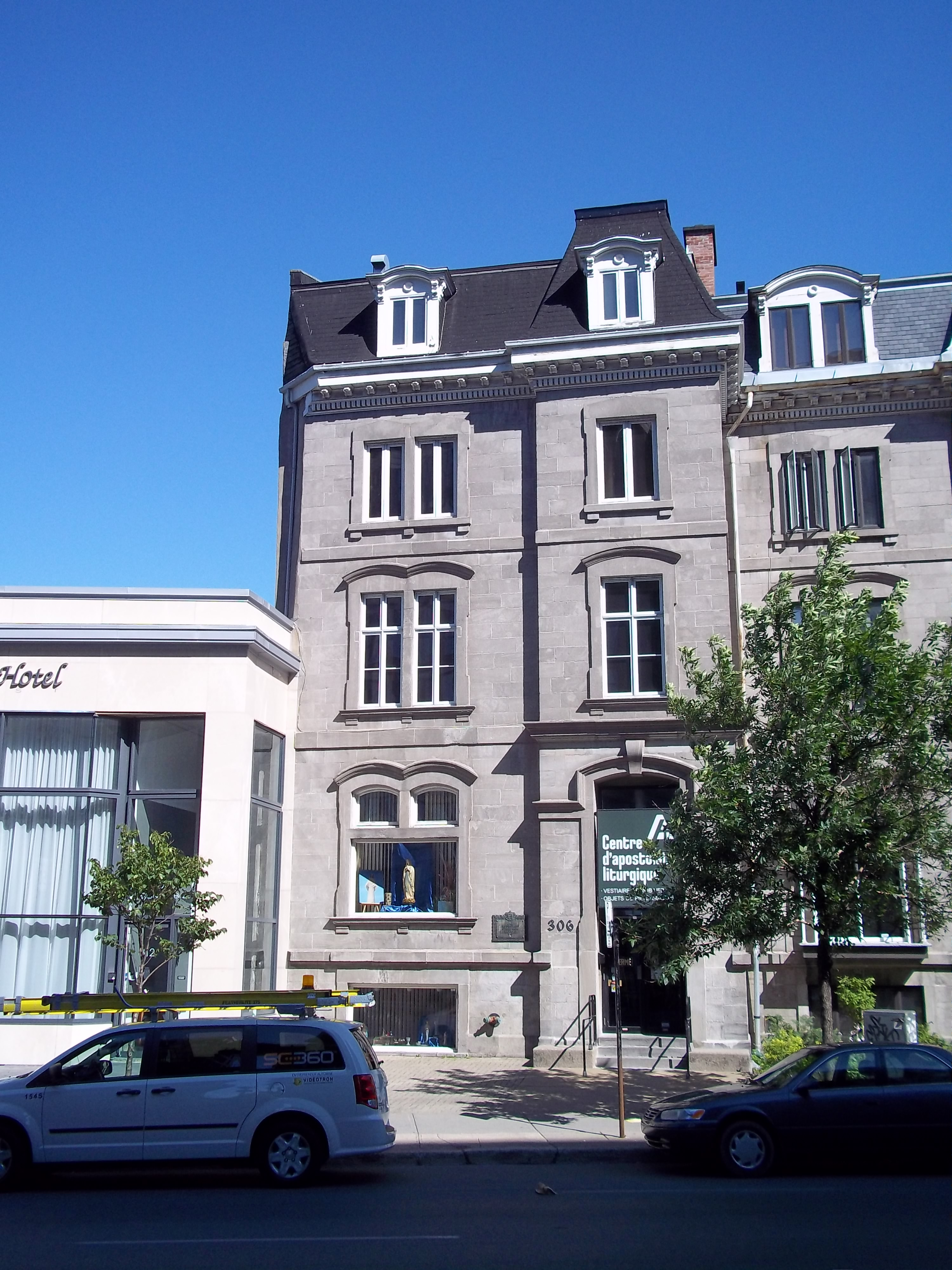 Maison Louis-Fréchette, 306, rue Sherbrooke est, Montréal